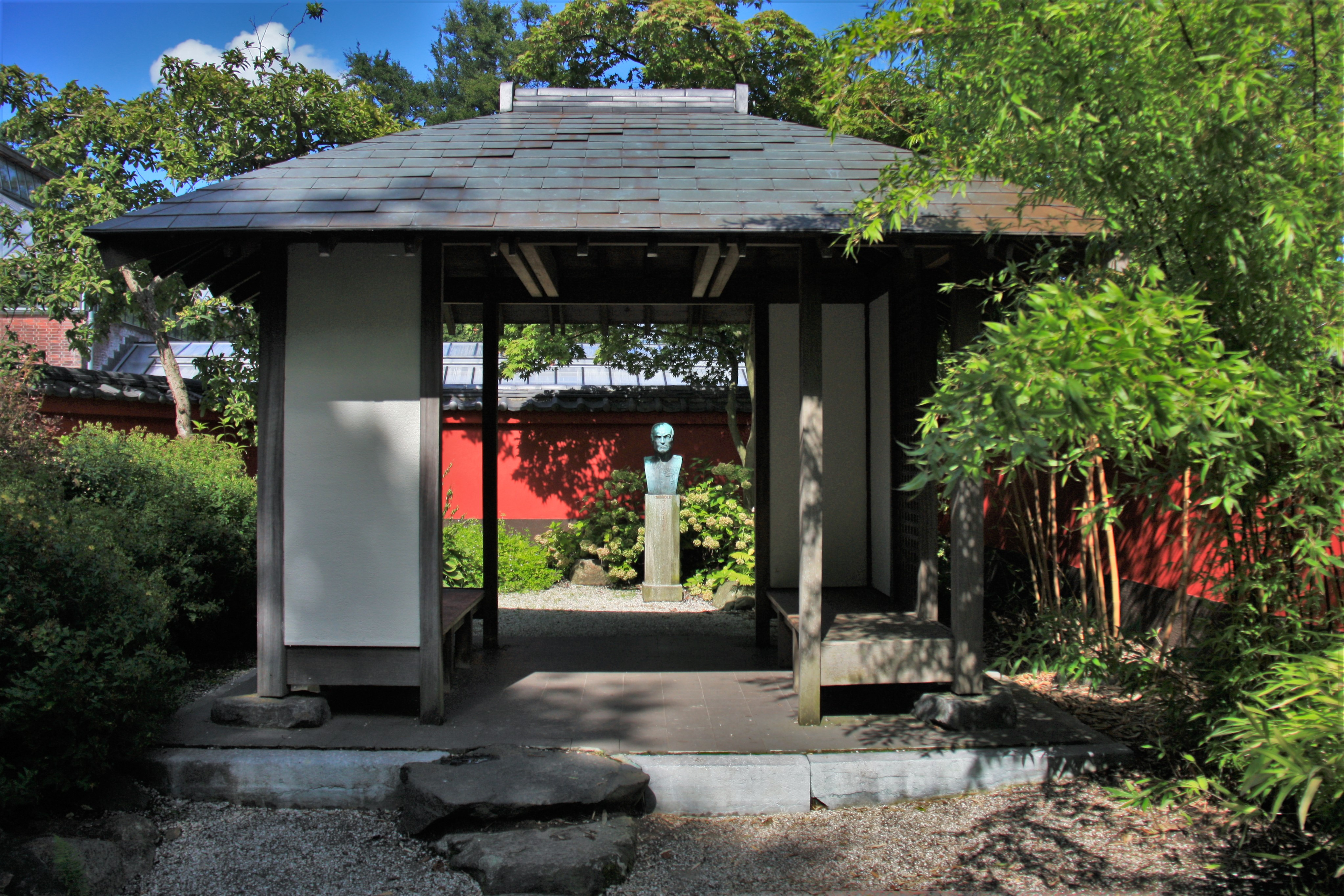 Чайний будинок у Лейденському ботанічному саду